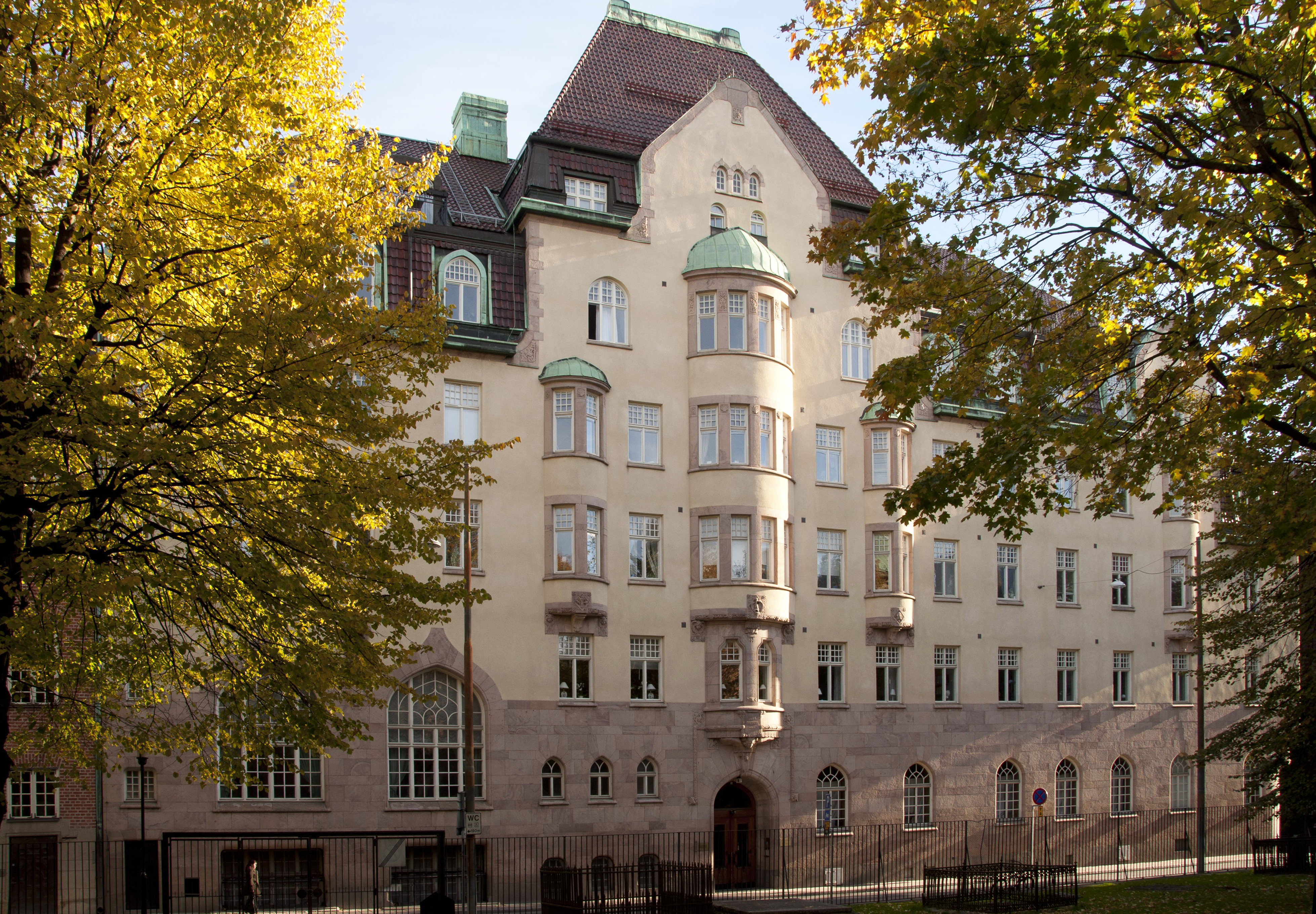 Klara församlingshus. Byggnadsår 1907-10, arkitekt Georg Ringström, byggherre Klara församling, byggmästare L Bäckvall